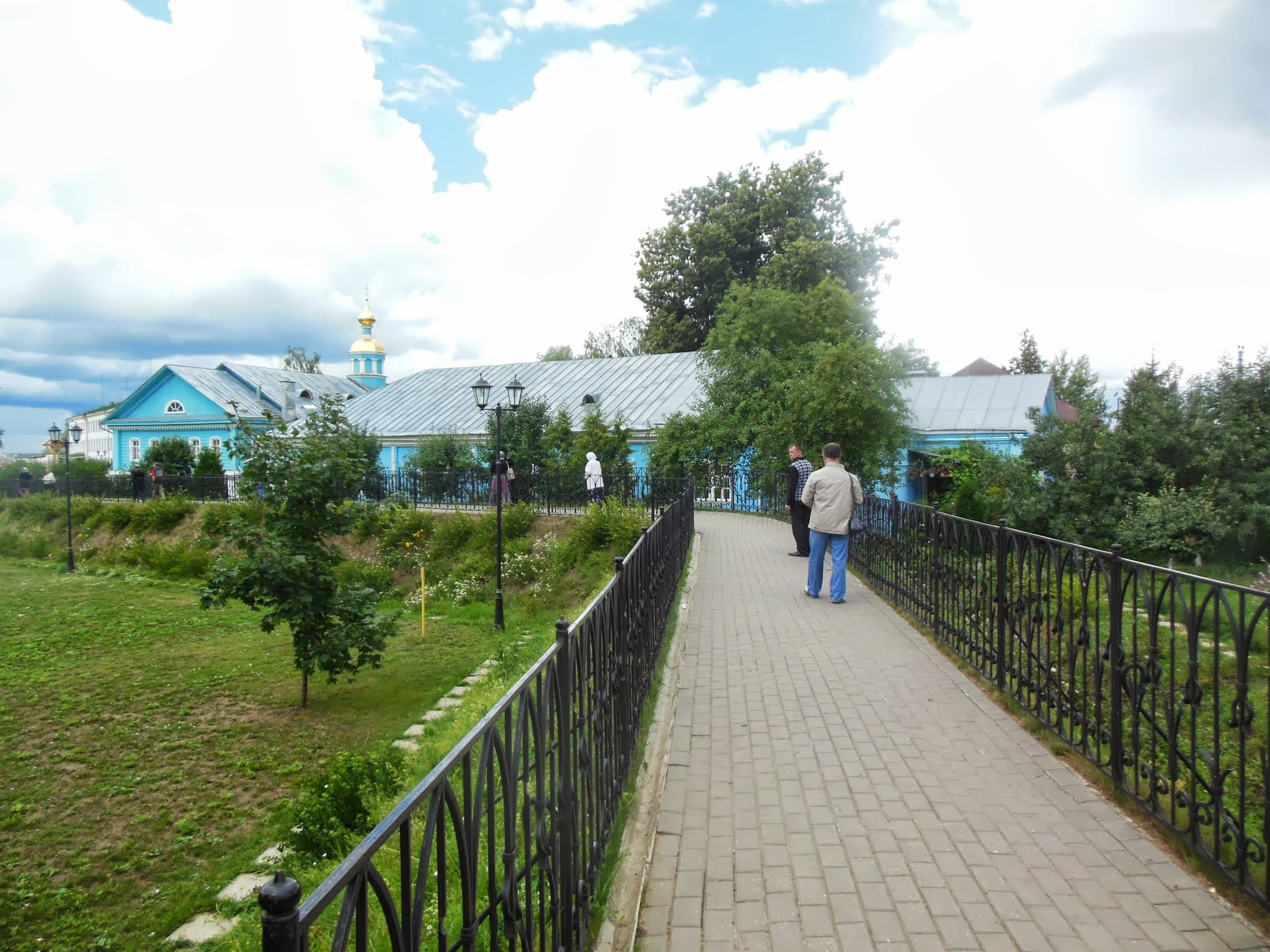 Diveyevo, Nizhny Novgorod Oblast, Russia, 607320